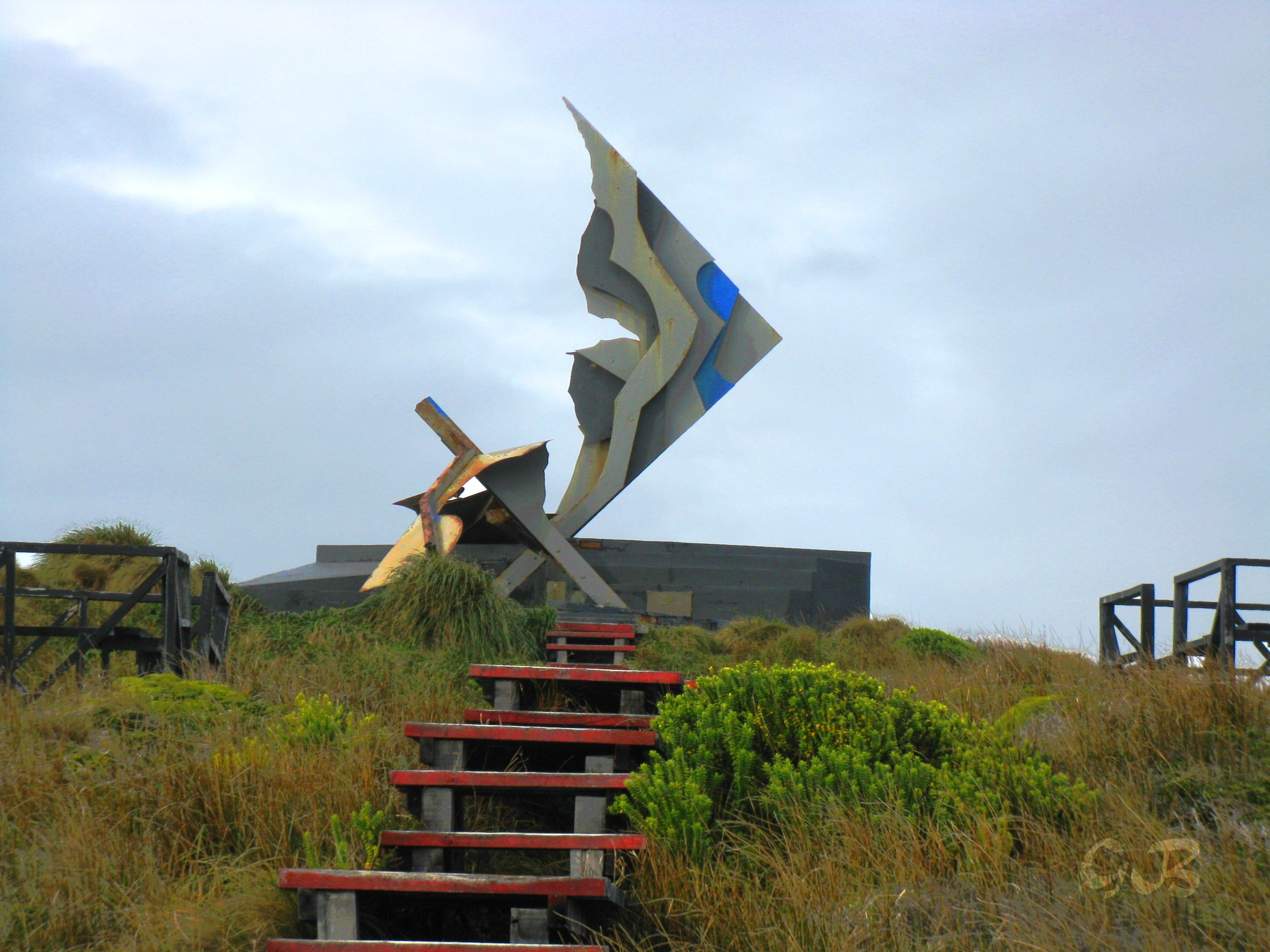 Das Kap-Horn-Denkmal nach einem Sturm am 10. November 2014